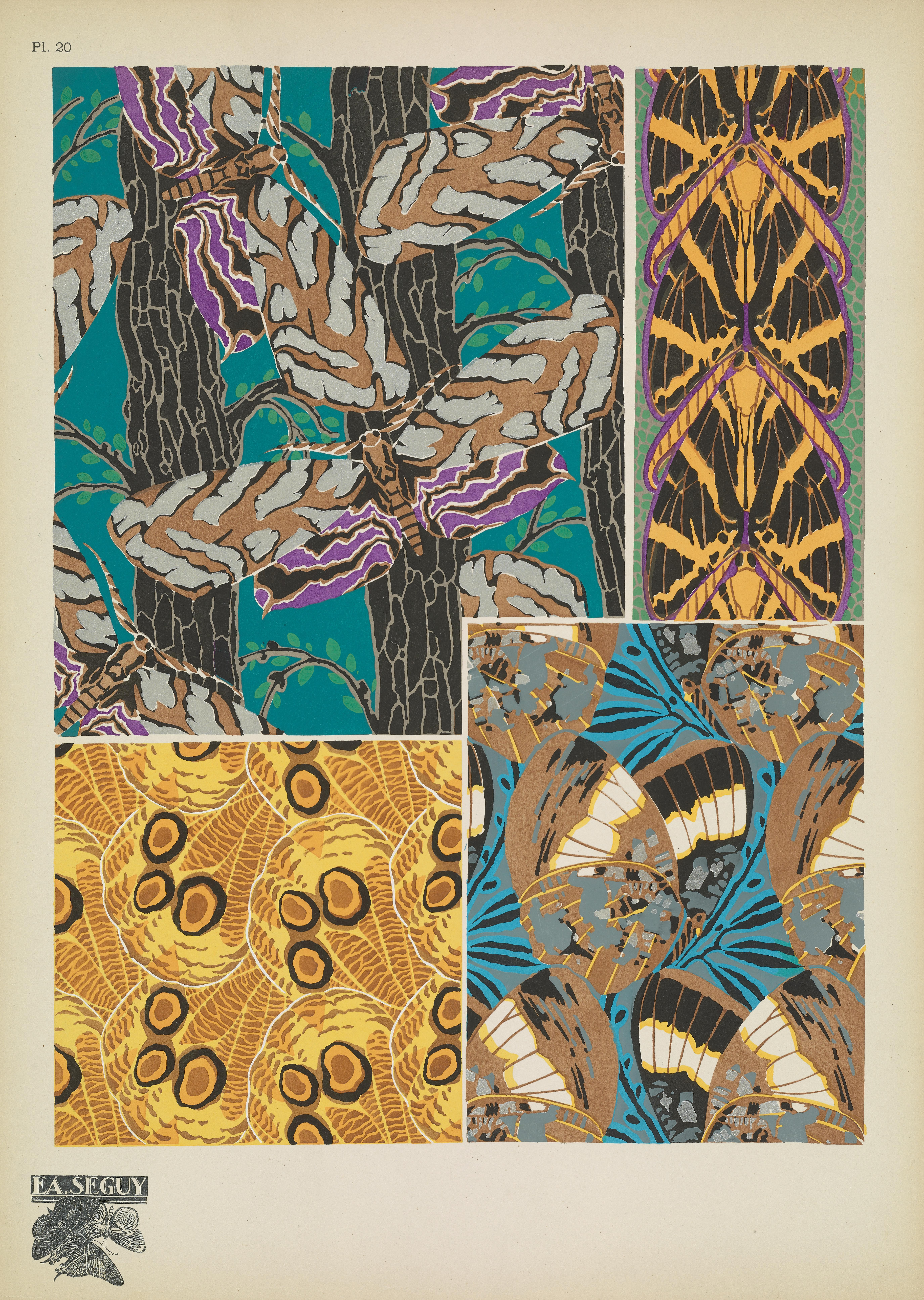 Papillons